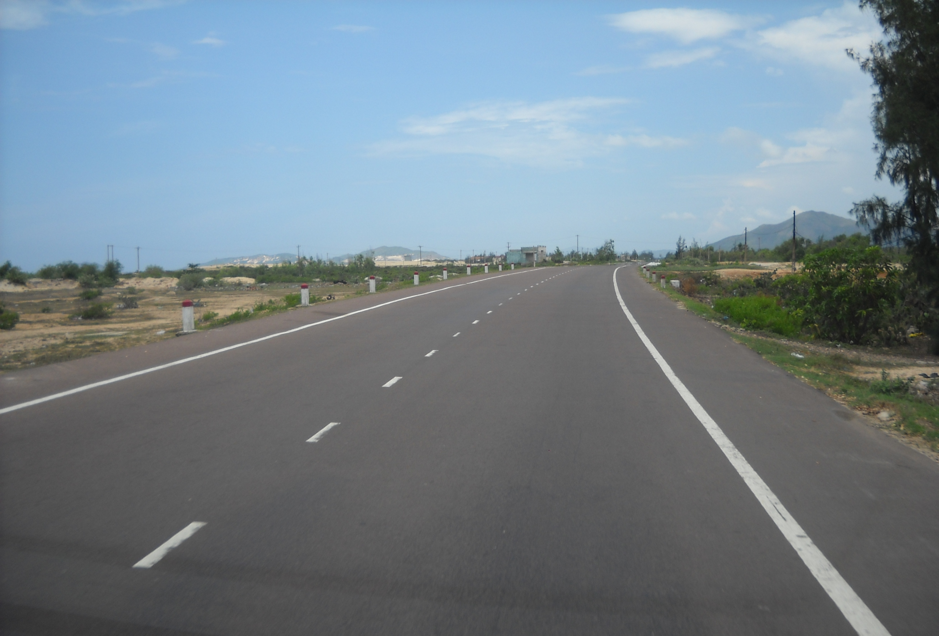 Quốc lộ 1D, đoạn qua thị xã Sông Cầu